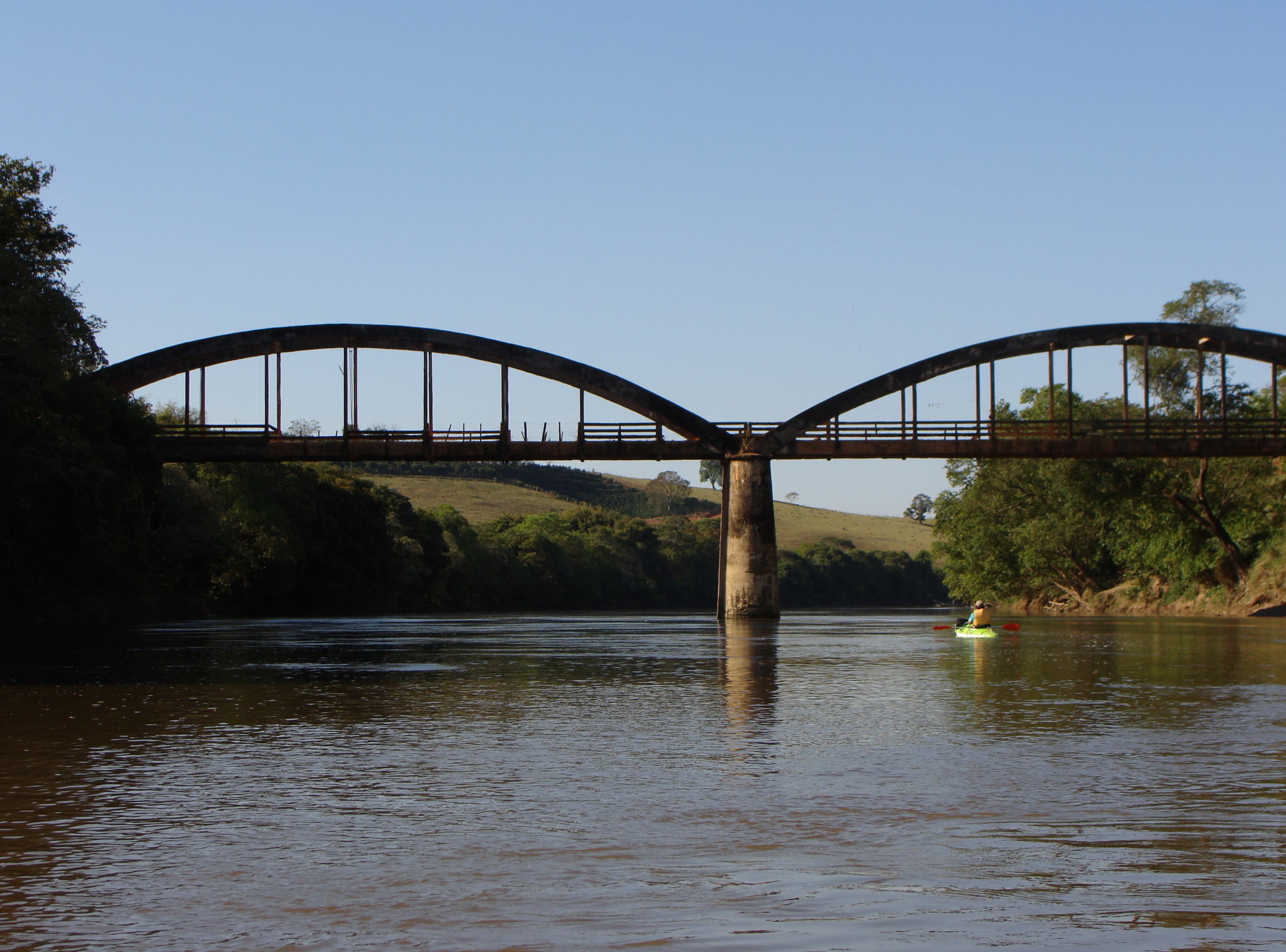 Ponte que liga Cordislândia-MG à Machado-MG